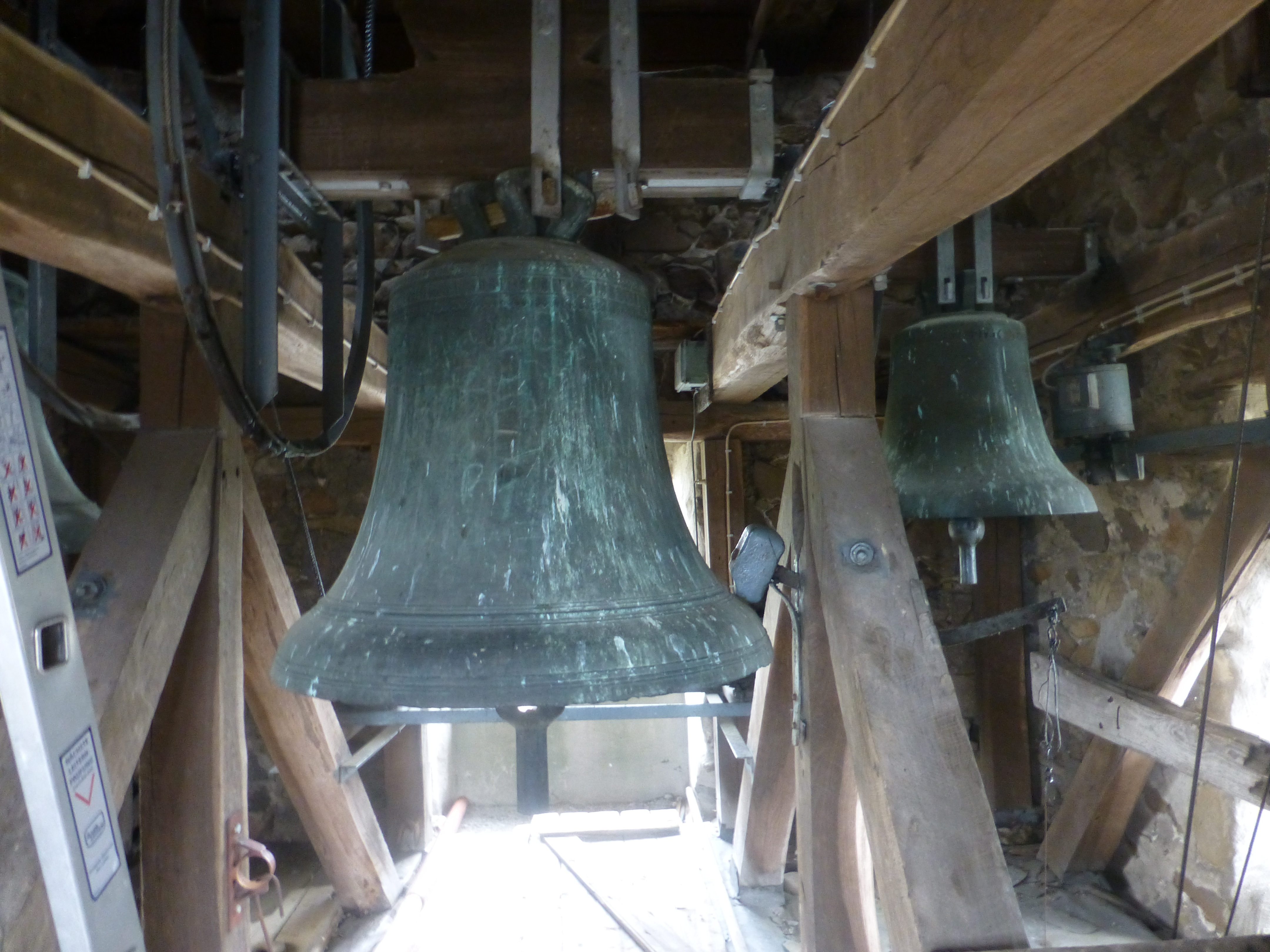 St. Johannes in Lahr: Glocken